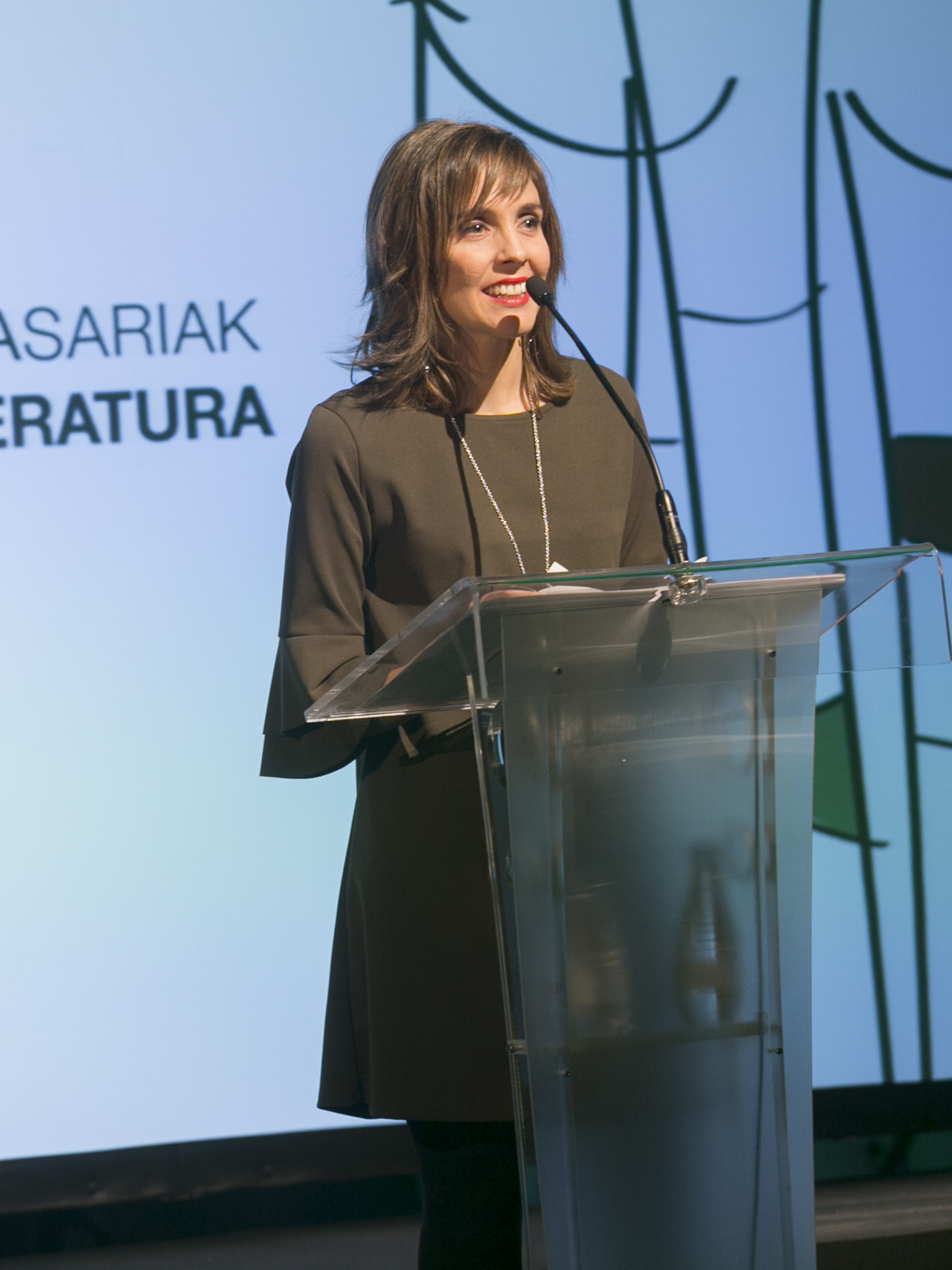 El Lehendakari Iñigo Urkullu ha presidido hoy la gala de entrega de los Premios Euskadi de Literatura, un acto que ha tenido lugar en Azkuna Zentroa de Bilbao y en el que, por parte del Gobierno Vasco, ha participado también el consejero de Cultura y Política Lingüística, Bingen Zupiria. Al acto han asistido los siete premiados de la presente edición: Asier Serrano, en la modalidad de Literatura en Euskera; Fernando Aramburu, en la de Literatura en Castellano; Arantxa Urretabizkaia, Ensayo en Euskera; Ander Izagirre, Ensayo en Castellano; Leire Bilbao, Literatura Infantil y Juvenil; Mikel Valverde, en la modalidad de Ilustración de Obra Literaria; y, por último, Matías Múgica, Traducción de Obra Literaria en Euskera.